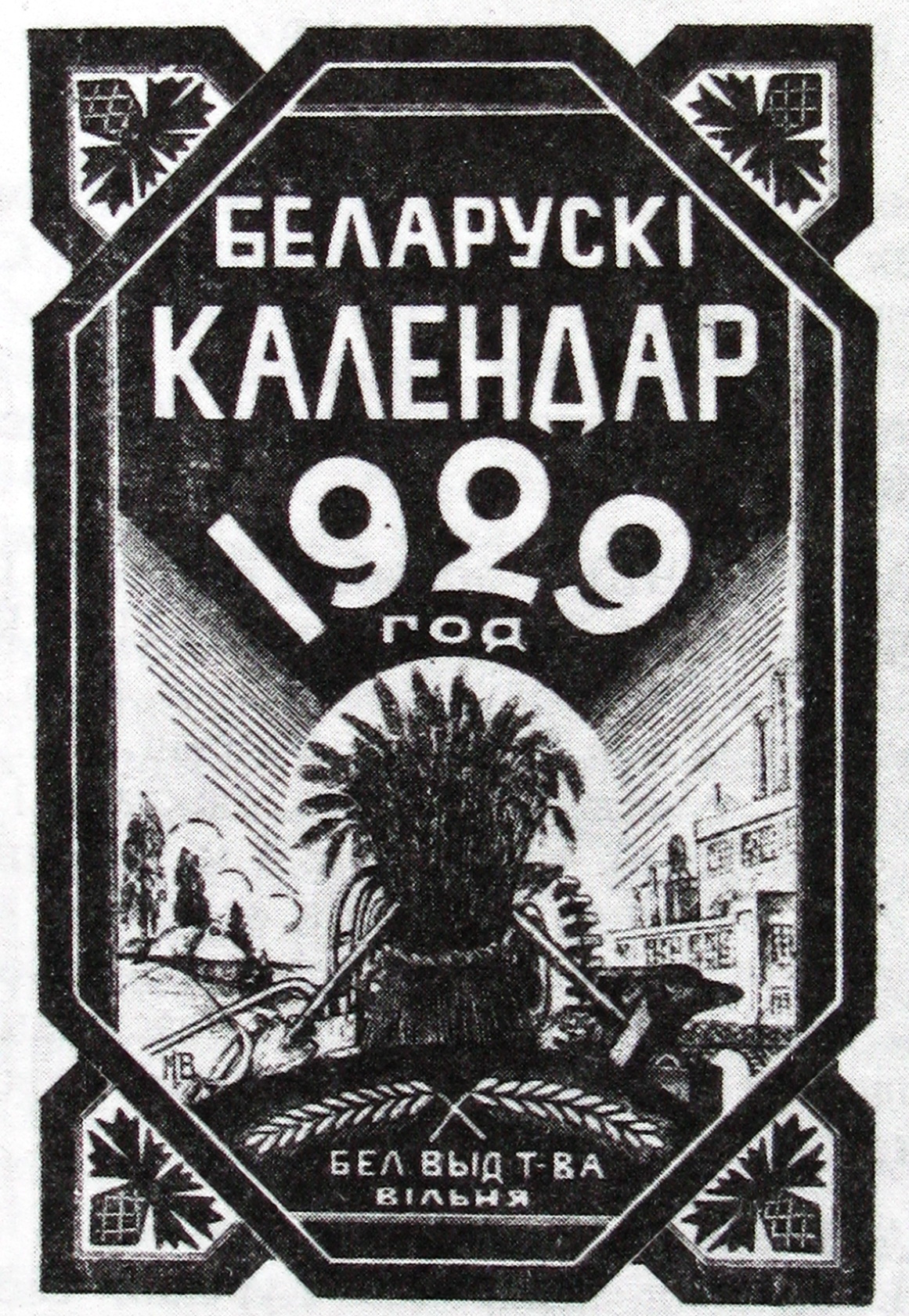 Вокладка кнігі «Беларускі каляндар 1929 год»: Беларускае выдавецкае таварыства, г. Вільня